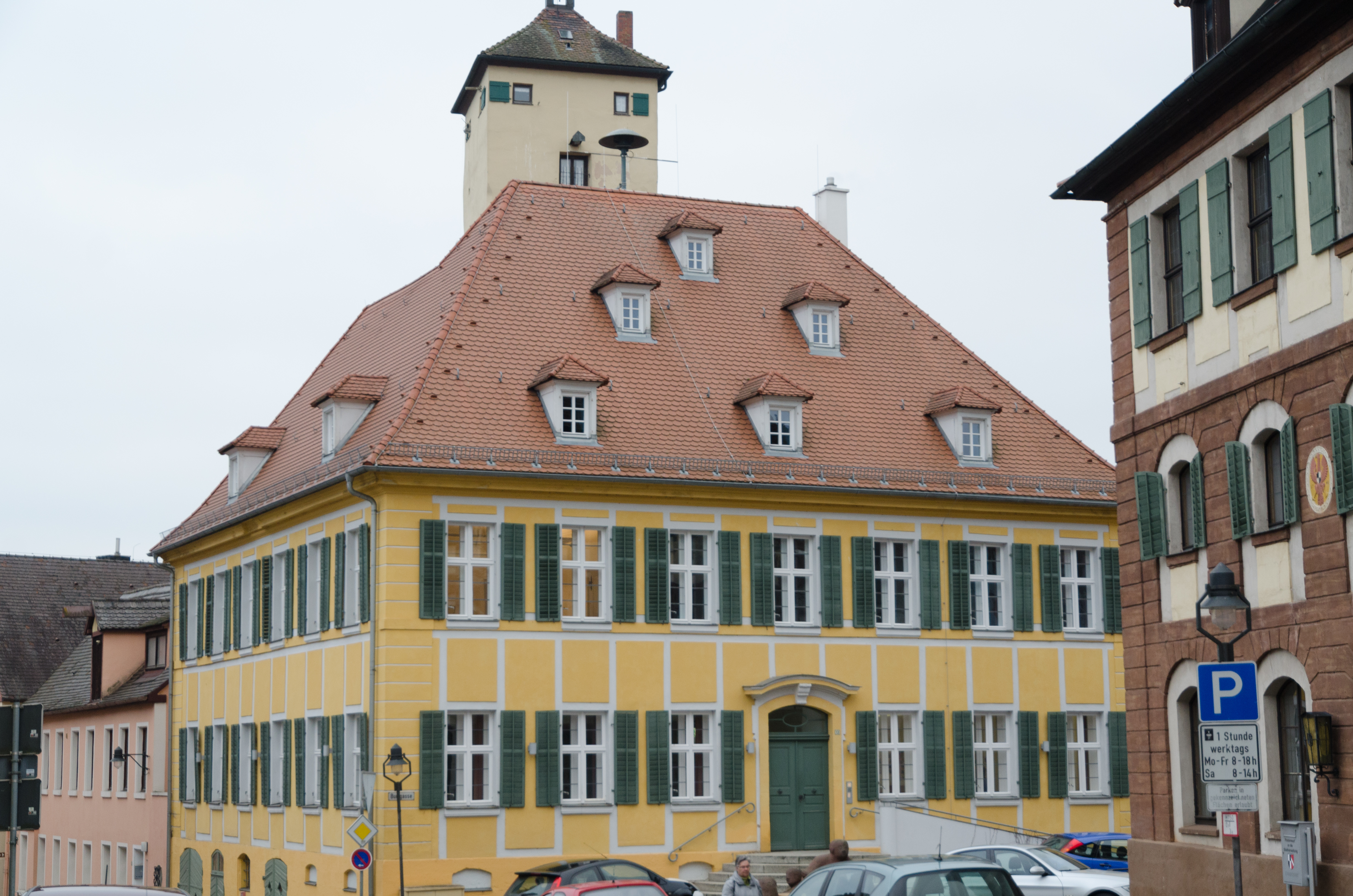 Windsbach, Hauptstraße 13